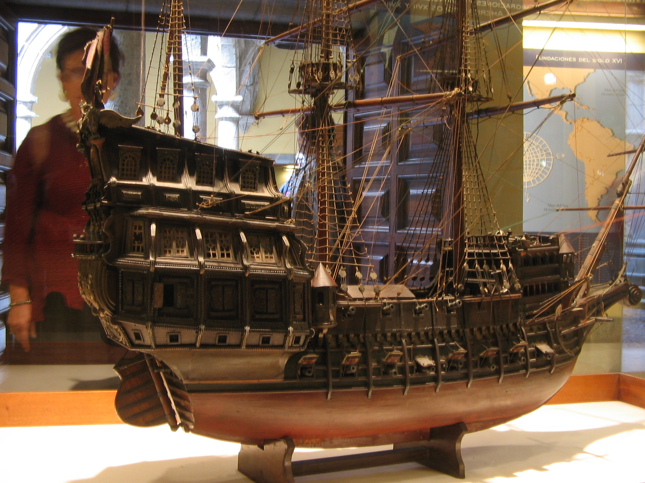 Kolumbus Museum